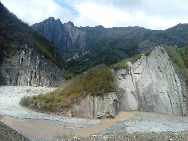 Горная река в Исмаиллиском районе Азербайджана